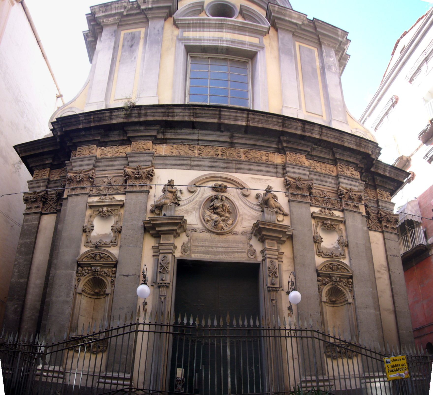 Napoli, Purgatorio ad Arco